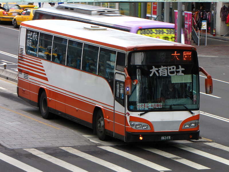 中文（台灣）: 大有巴士五十鈴LT134PMK大客車063-FR。